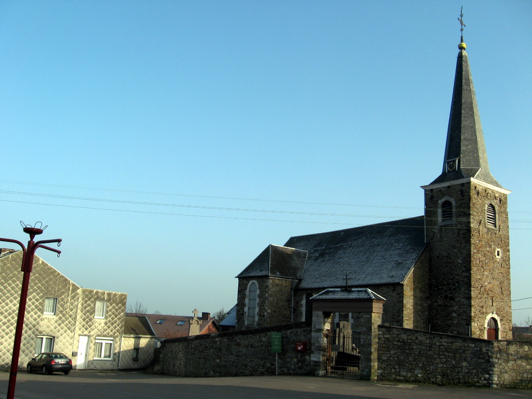 Sint-Andrieskerk in Cerexhe, Cerexhe-Heuseux